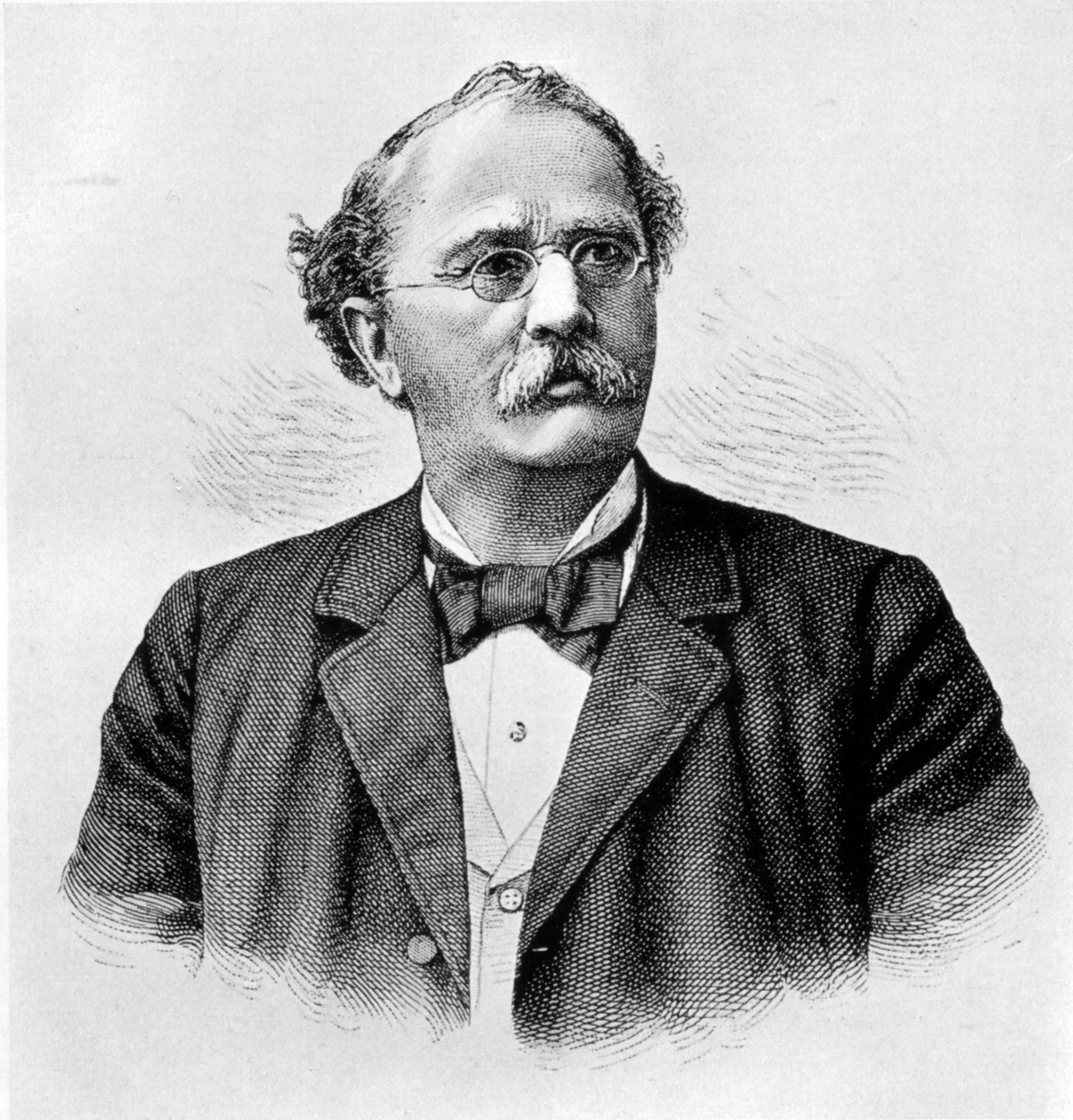 Adolf Guyer-Zeller (1839-1899), Schweizer Unternehmer und Eisenbahnpionier